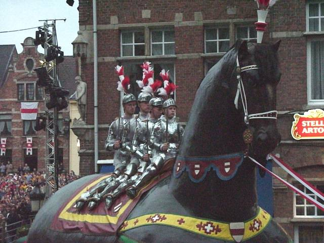 Ros beiaardommegang 2000 Gebroeders Coppieters.